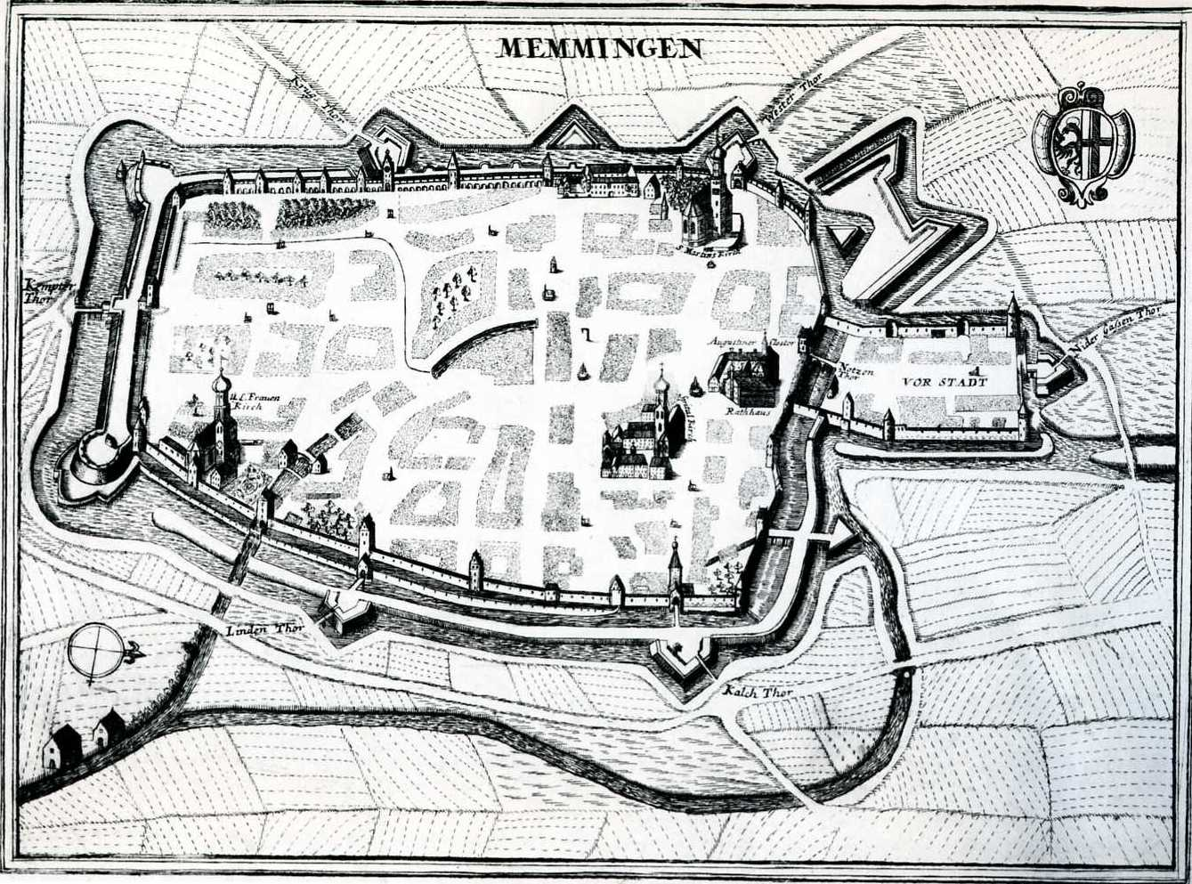 Plan von Memmingen, Kupferstich nach Matthäus Merian von Gabriel Bodenehr